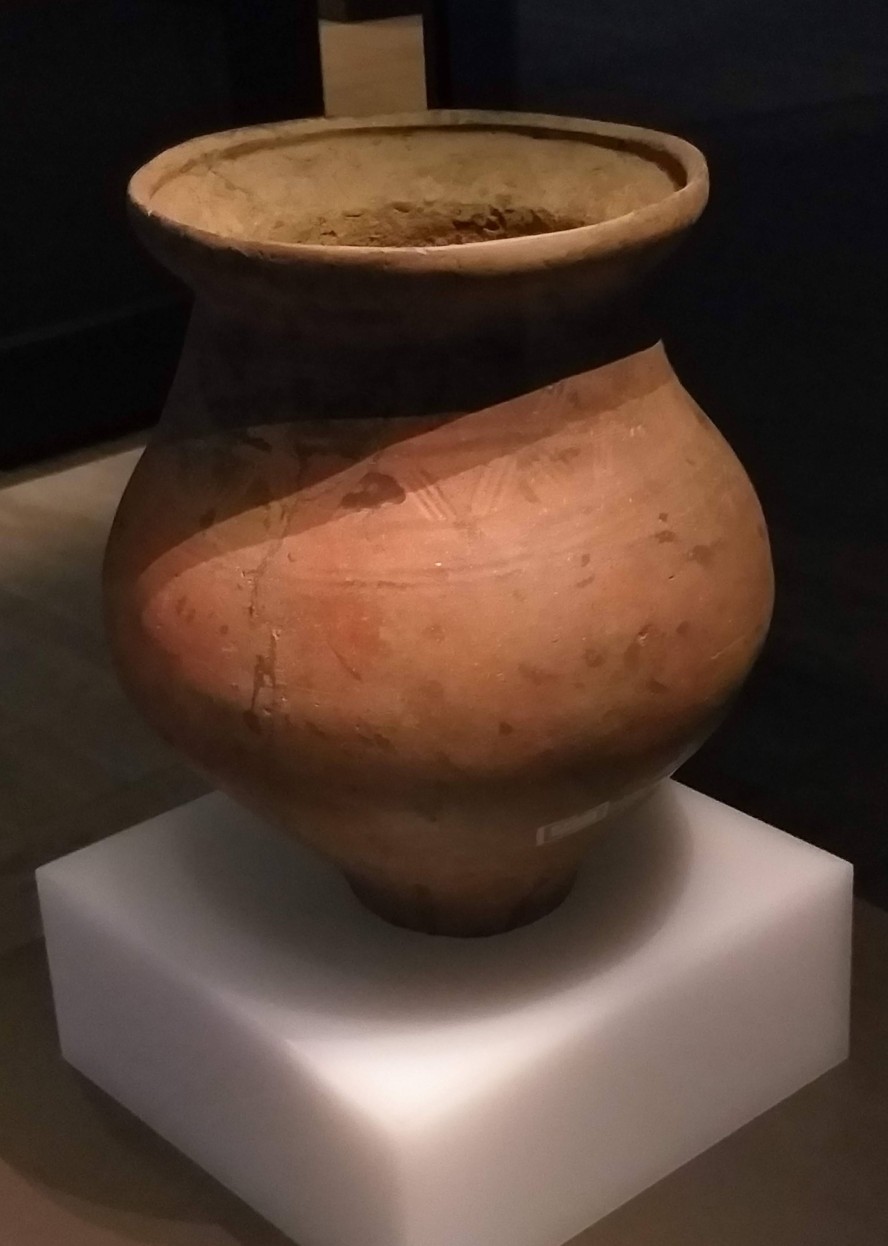 Urna cineraria de la necrópolis de Can Missert en Tarrasa (Barcelona, España) de los inicios del Bronce Final. Depósito del Museo de Arqueología de Cataluña (Barcelona) en el Museo Arqueológico Nacional (Madrid, España).